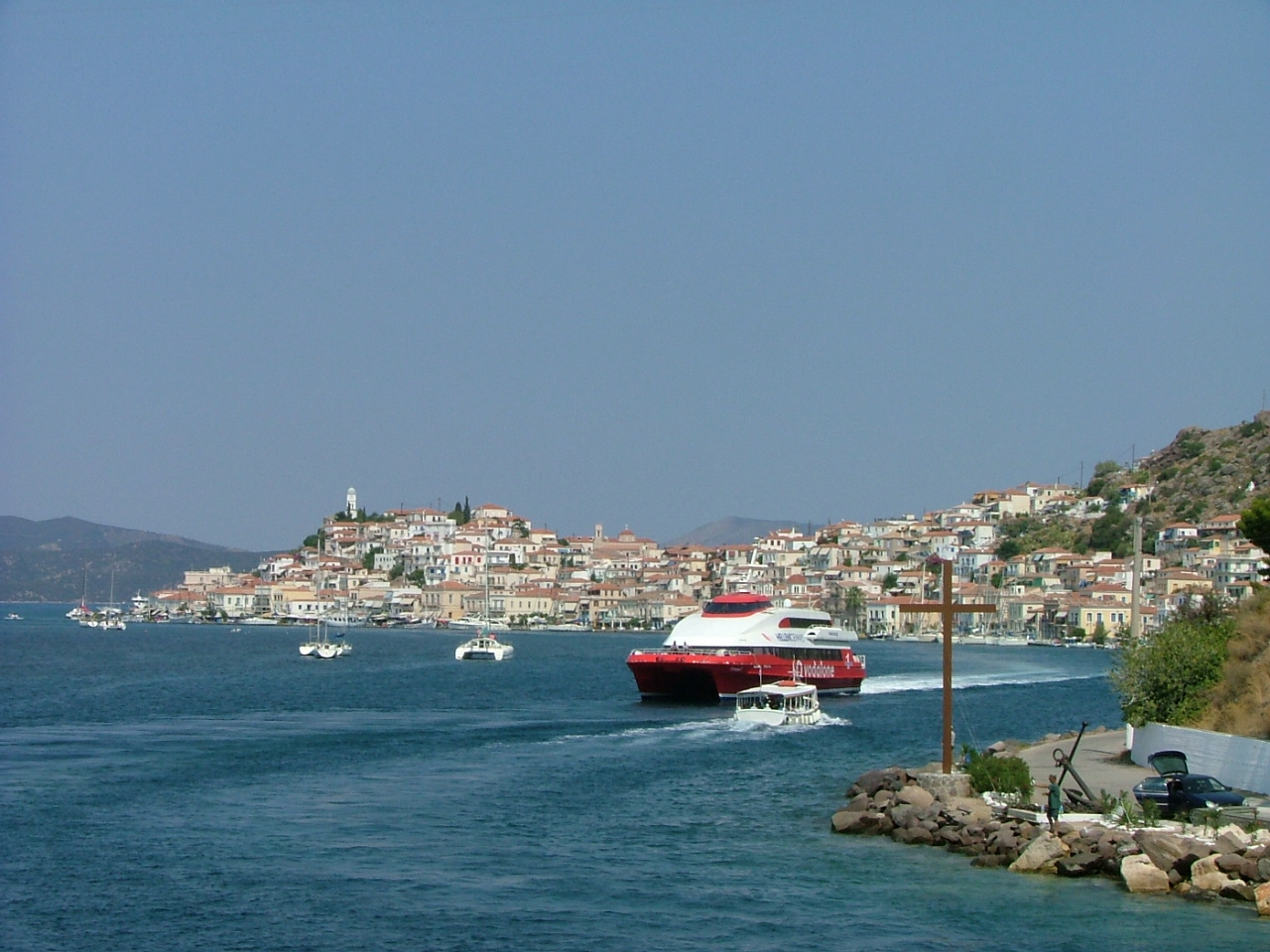 Panorámica de Poros, isla del golfo Sarónico (mar Egeo), perteneciente a Grecia.